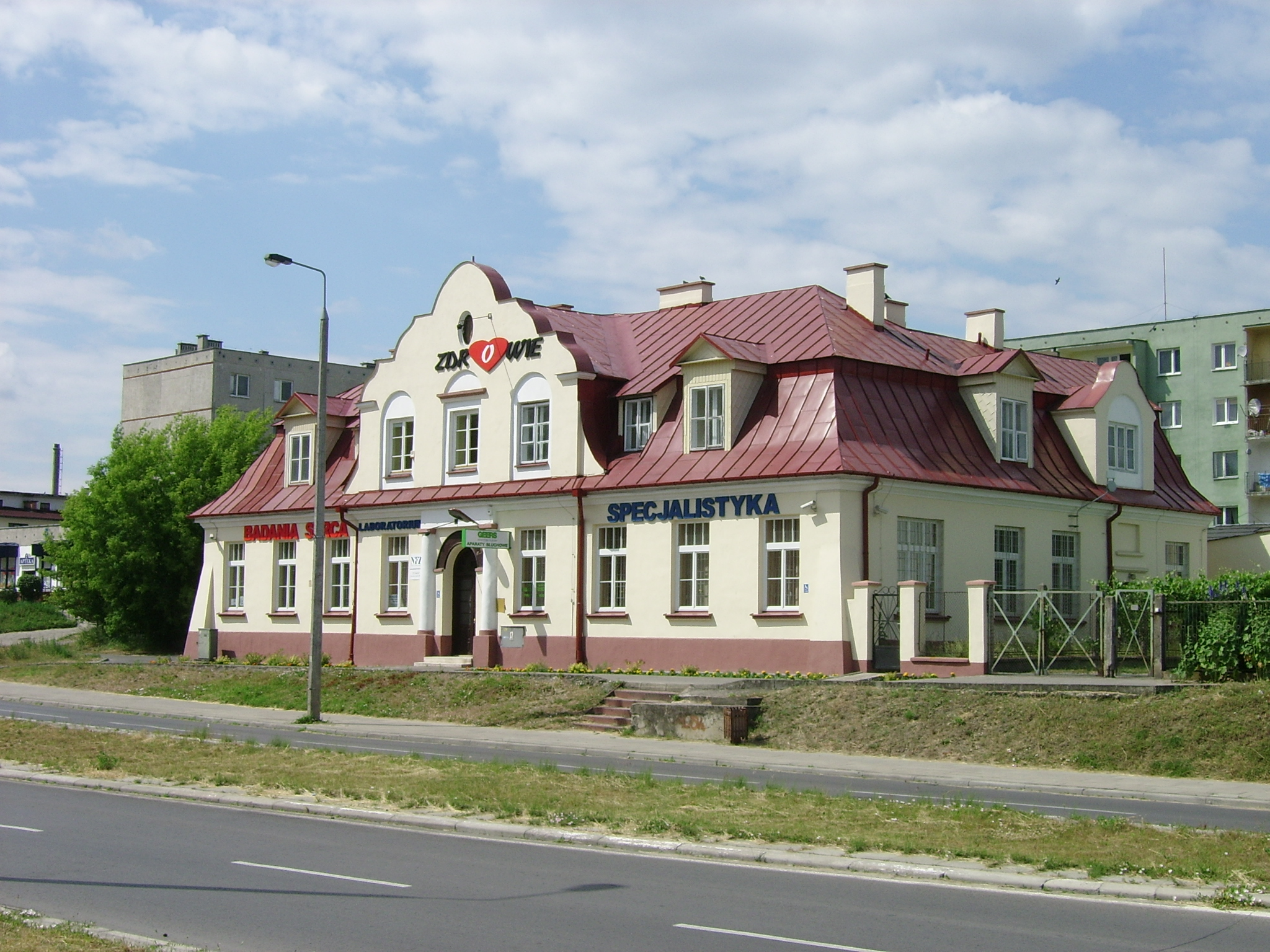 Pionki, ul. Legionistów 38 - budynek dawnej "Kasy Chorych"